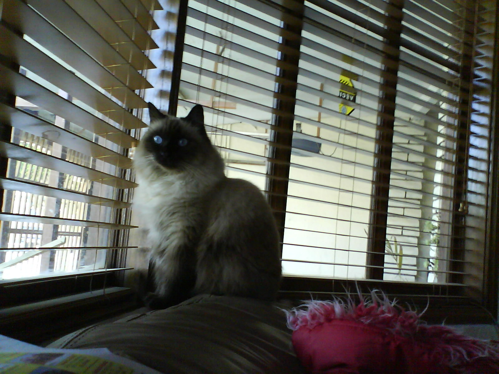 gato raza ragdoll 6 años de edad de nombre gaucha